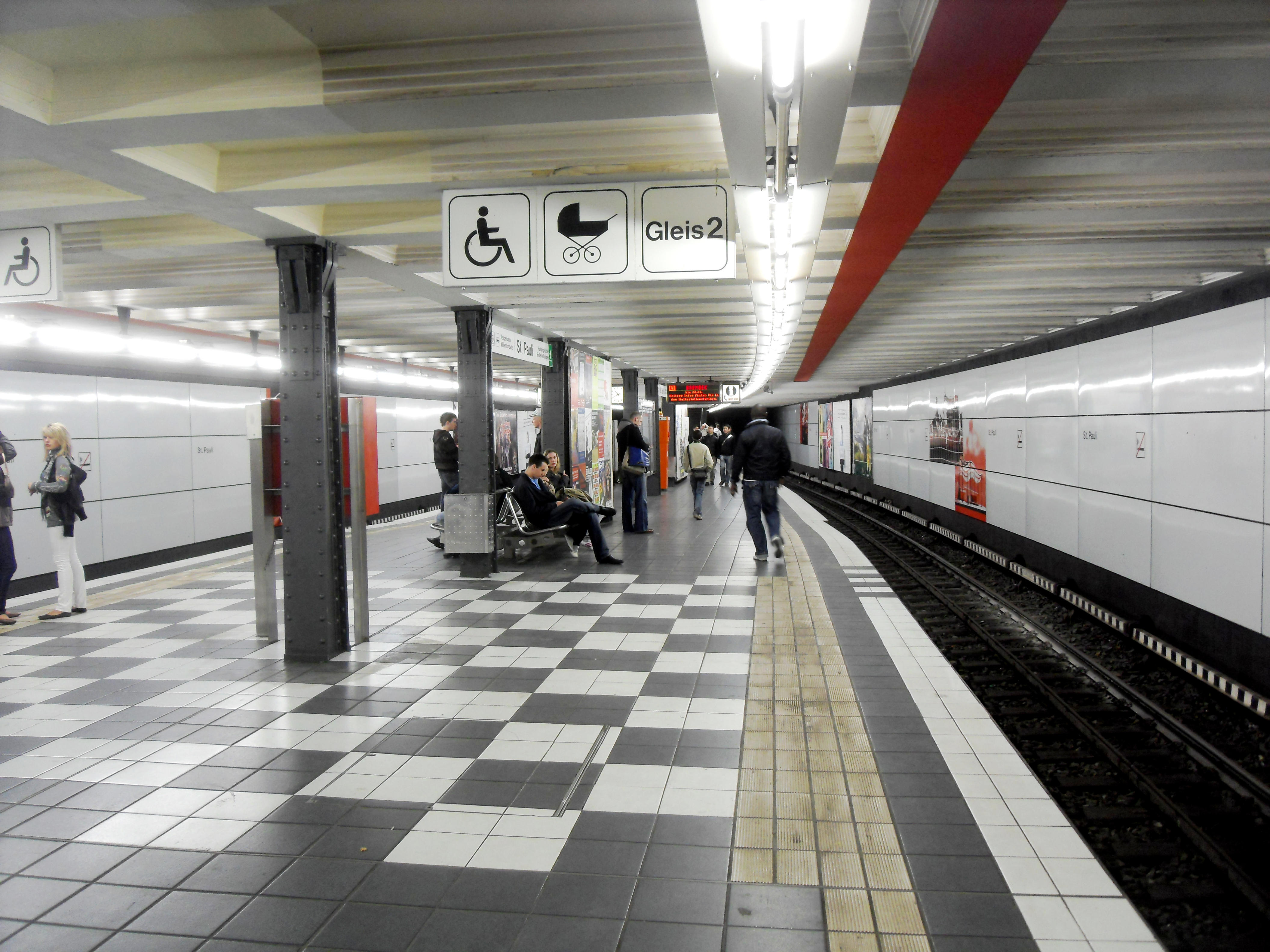 Der Hamburger U-Bahnhof St. Pauli in Deutschland